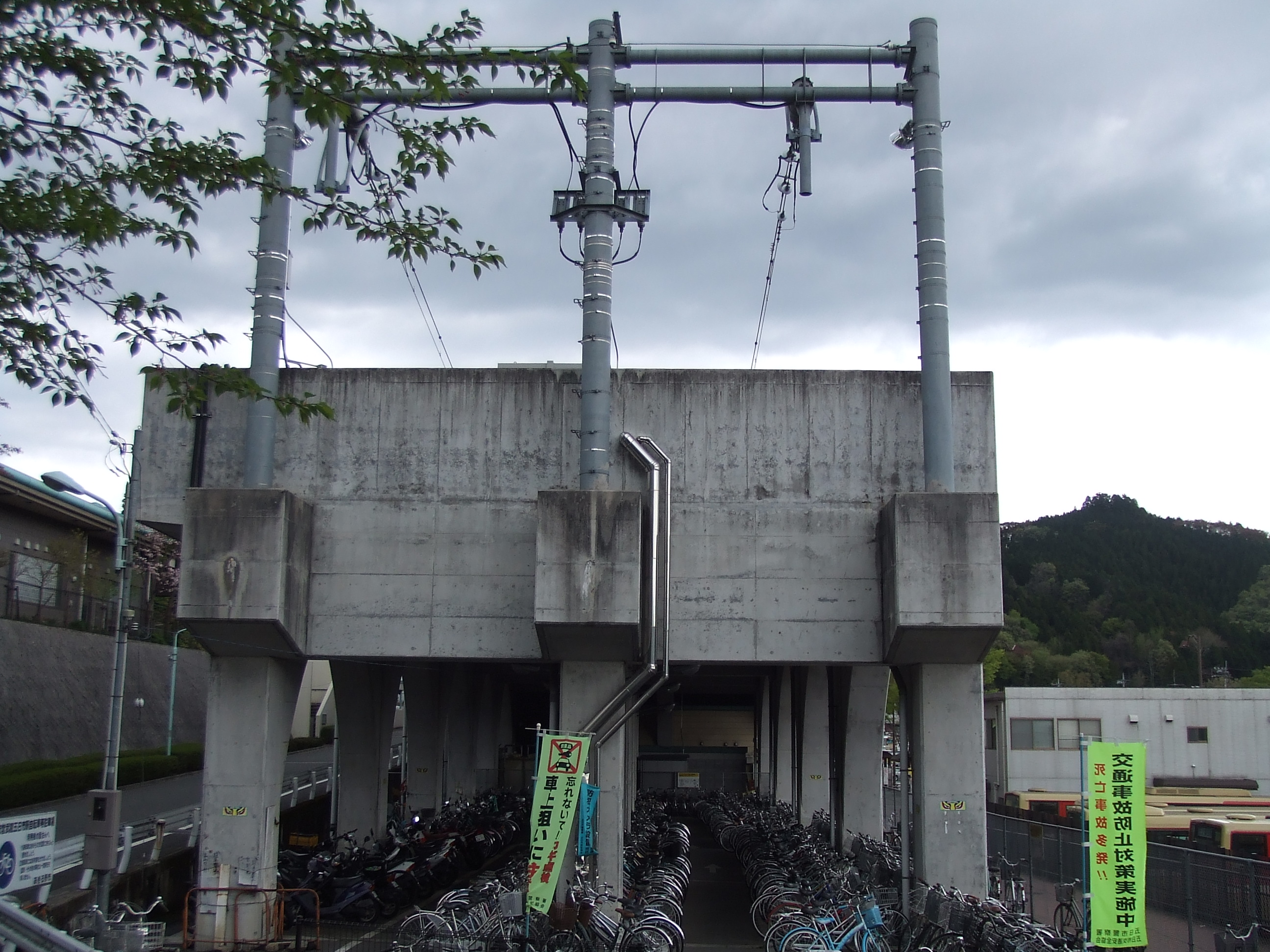 武蔵五日市駅 終端